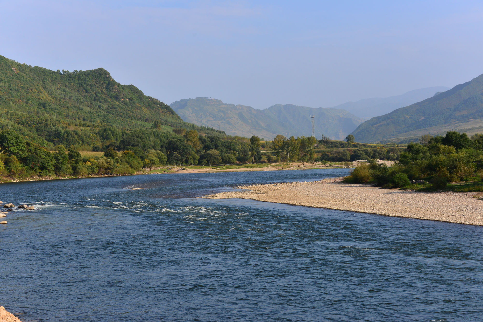 巡道工出品 Photo by xundaogong